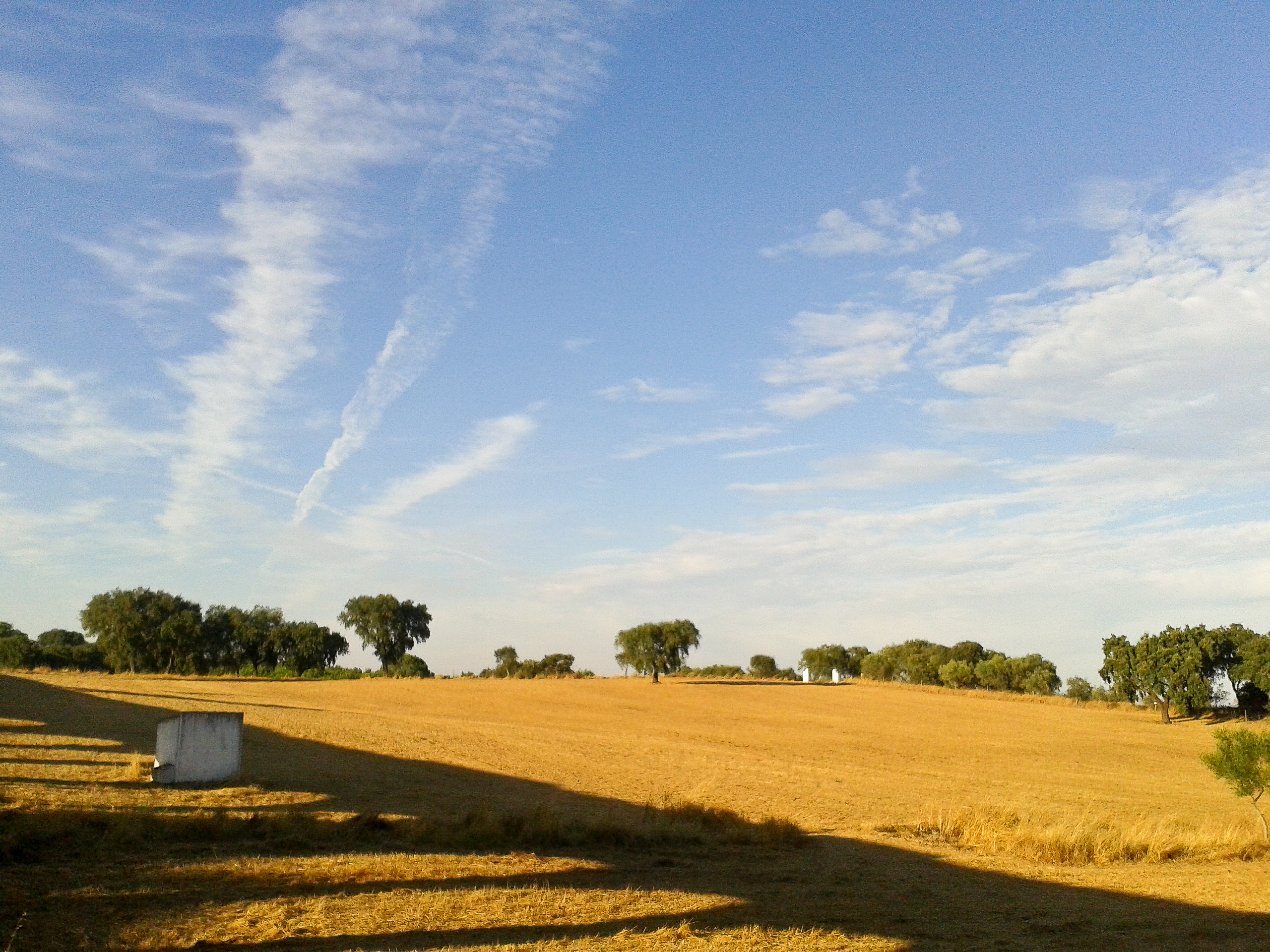 Paisagem alentejana com pasto estival no percurso ambiental do Aqueduto da Água da Prata.